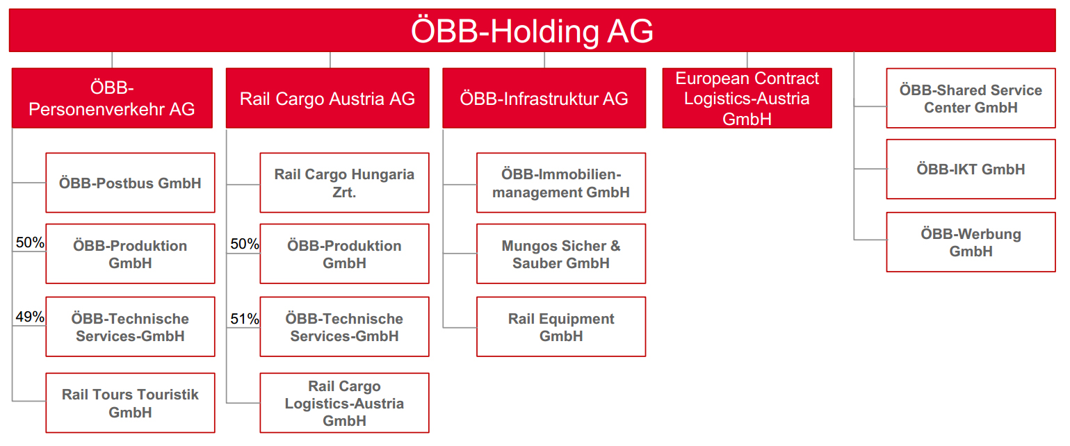 ÖBB-Konzernorganigramm Stand April 2014